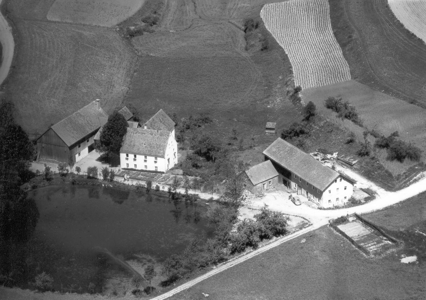 Kroau, Gemeinde Gleiritsch (1960)